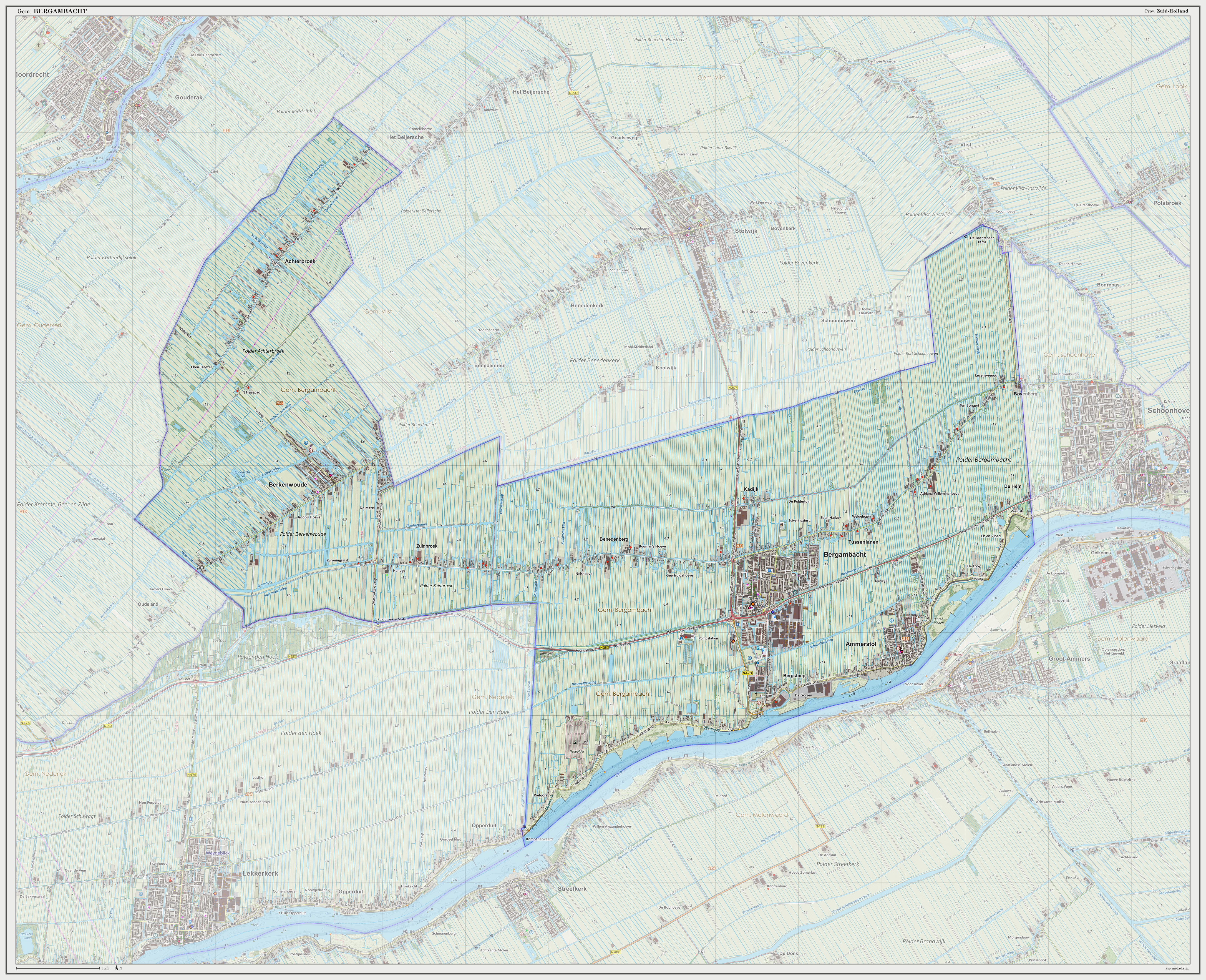 Topografische gemeentekaart per september 2014. Resolutie: 300 pixels/km. Kaartbeeld samengesteld uit de open geodata van de Top10NL en Top25namen (Kadaster, 30-sep-2014), Creative Commons-BY licentie. Gebouwvlakken uit open geodata BAG extract (8-sep-2014). Wegen uit de OpenStreetMap (15-sep-2014), OpenStreetMap community. Reliëfschaduw uit de Actuele Hoogtekaart AHN2 (8-mrt-2014). Samenstelling en kleurenschema: Jan-Willem van Aalst, met QGIS. Zie ook de Legenda.